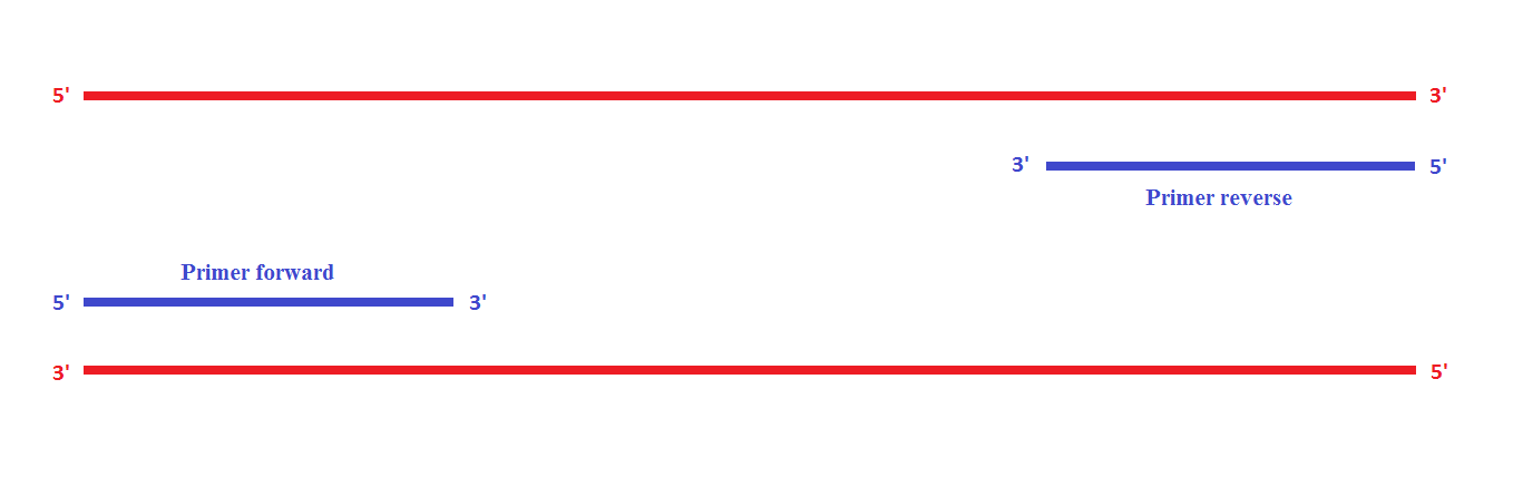 Schema dei primer per la PCR: il prodotto dell'amplificazione al termine del programma è il segmento di DNA compreso tra il primer forward e il primer reverse